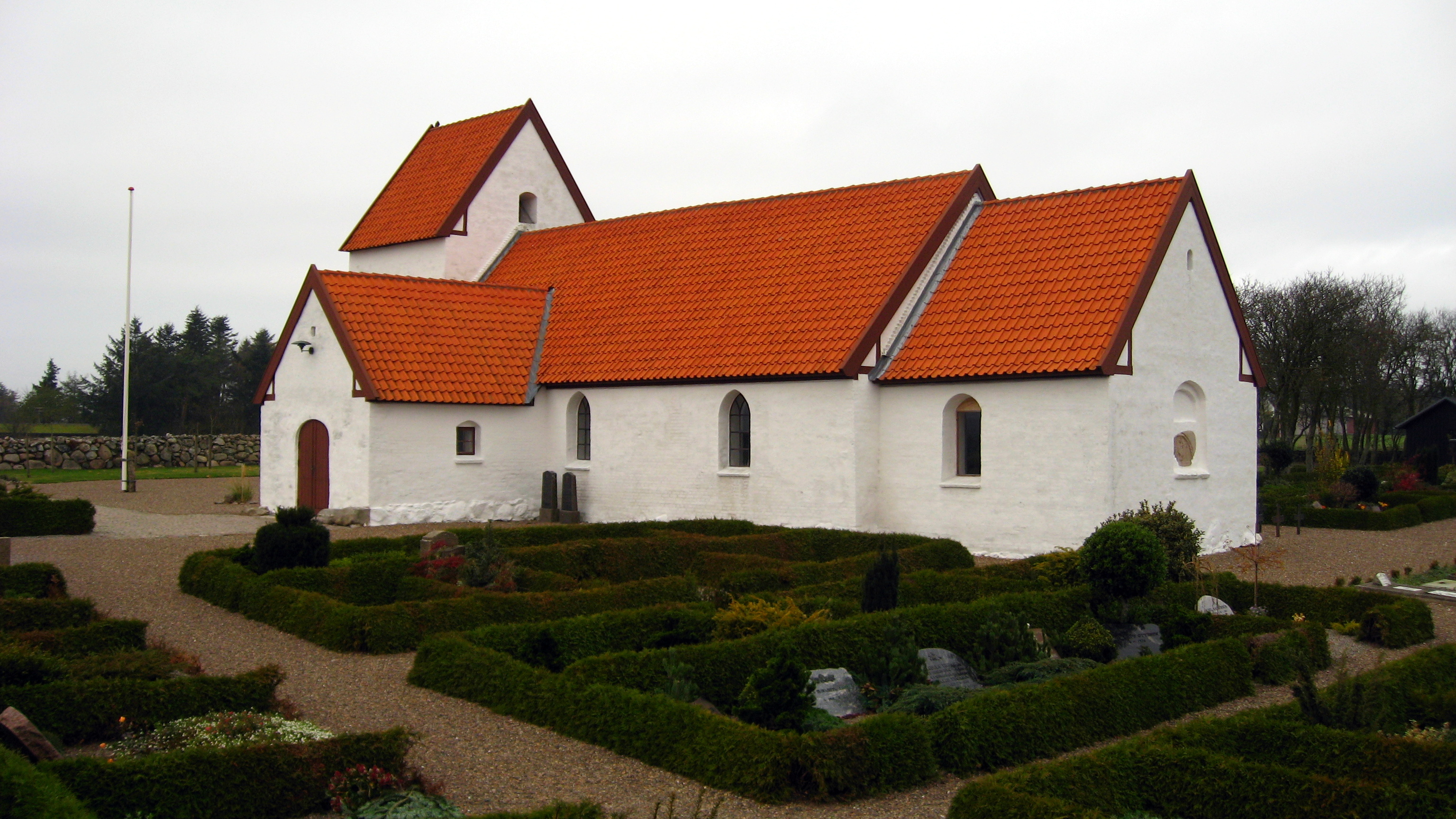 Lild Kirke, Thisted Kommune